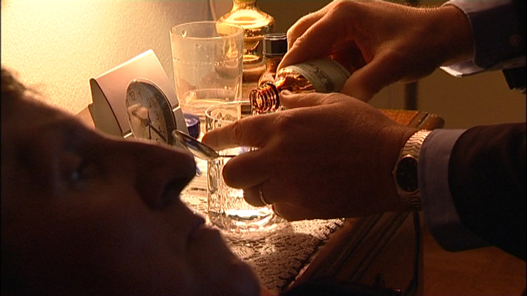 Le Dr Sobel prépare la potion létale. Image tirée du film « EXIT, le droit de mourir » de Fernand Melgar.